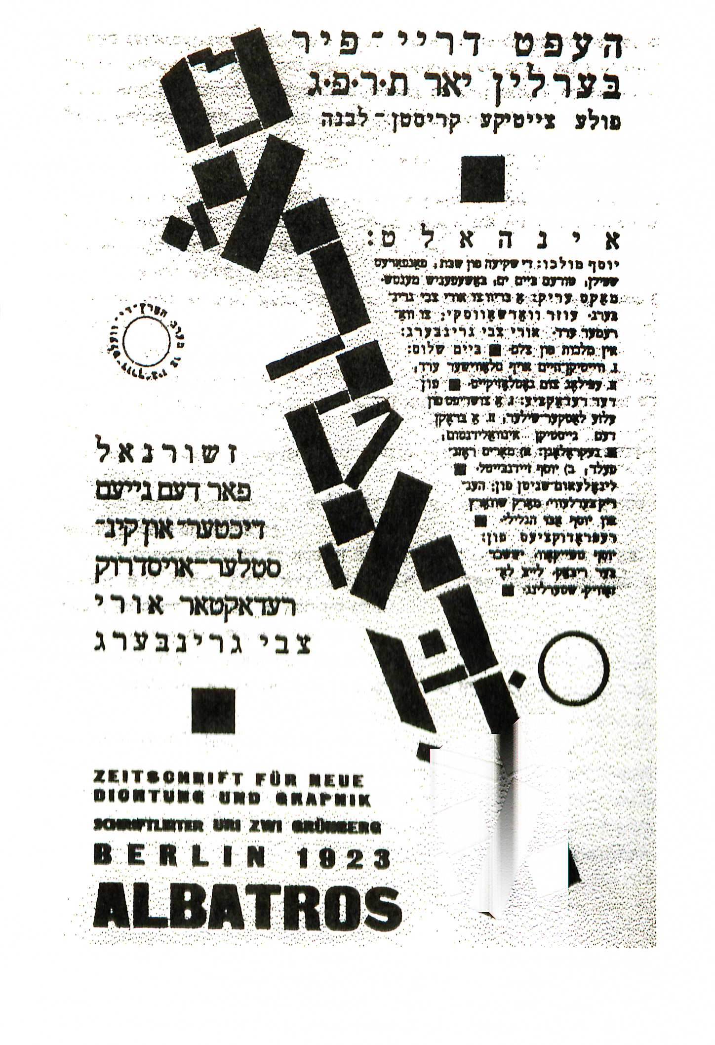 Albatros. Zeitschrift für neue Dichtung und Graphik. Berlin 1923 Heft 3/4 Titelblatt. Schriftleiter Uri Zvi Greenberg